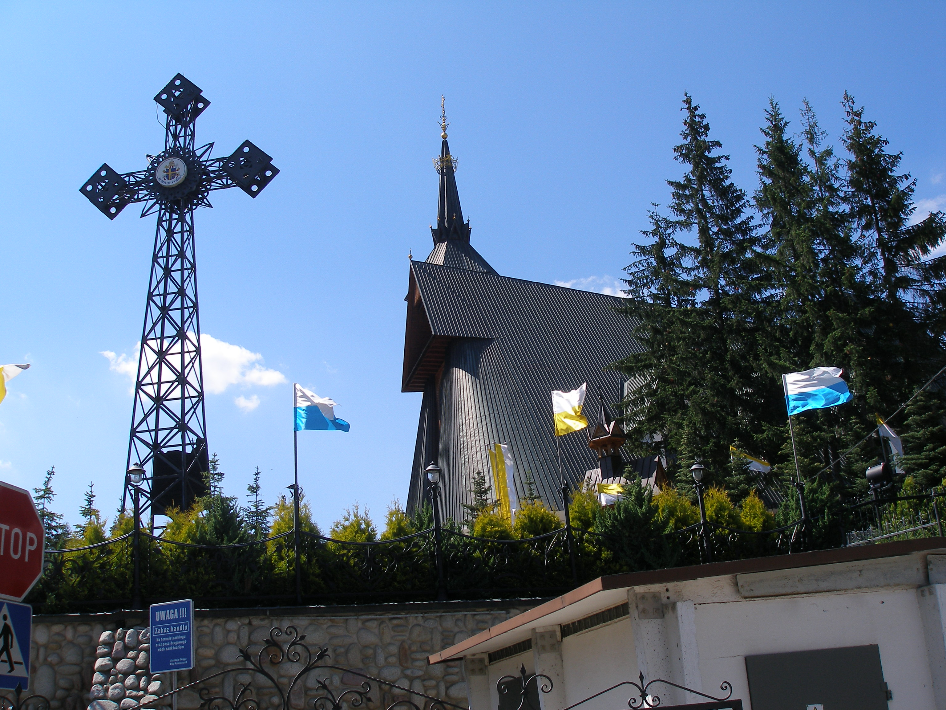 Sanktuarium "Matki Božej Fatimskej" v Zakopanom časť Krzeptówki. Kostol bol vysvätený v roku 1992.